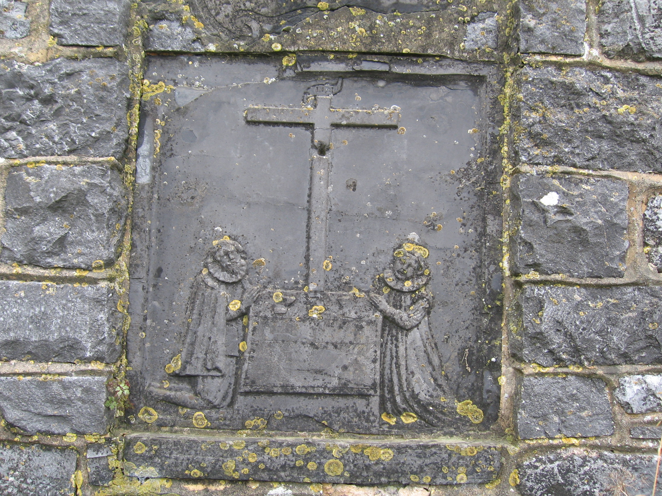 Croix, autel et bienfaiteurs dans un vieux mur (de la chapelle?) de Senenne, commune d'Anhée, près de Namur (Belgique).